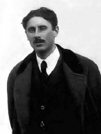 Giovanni Boine